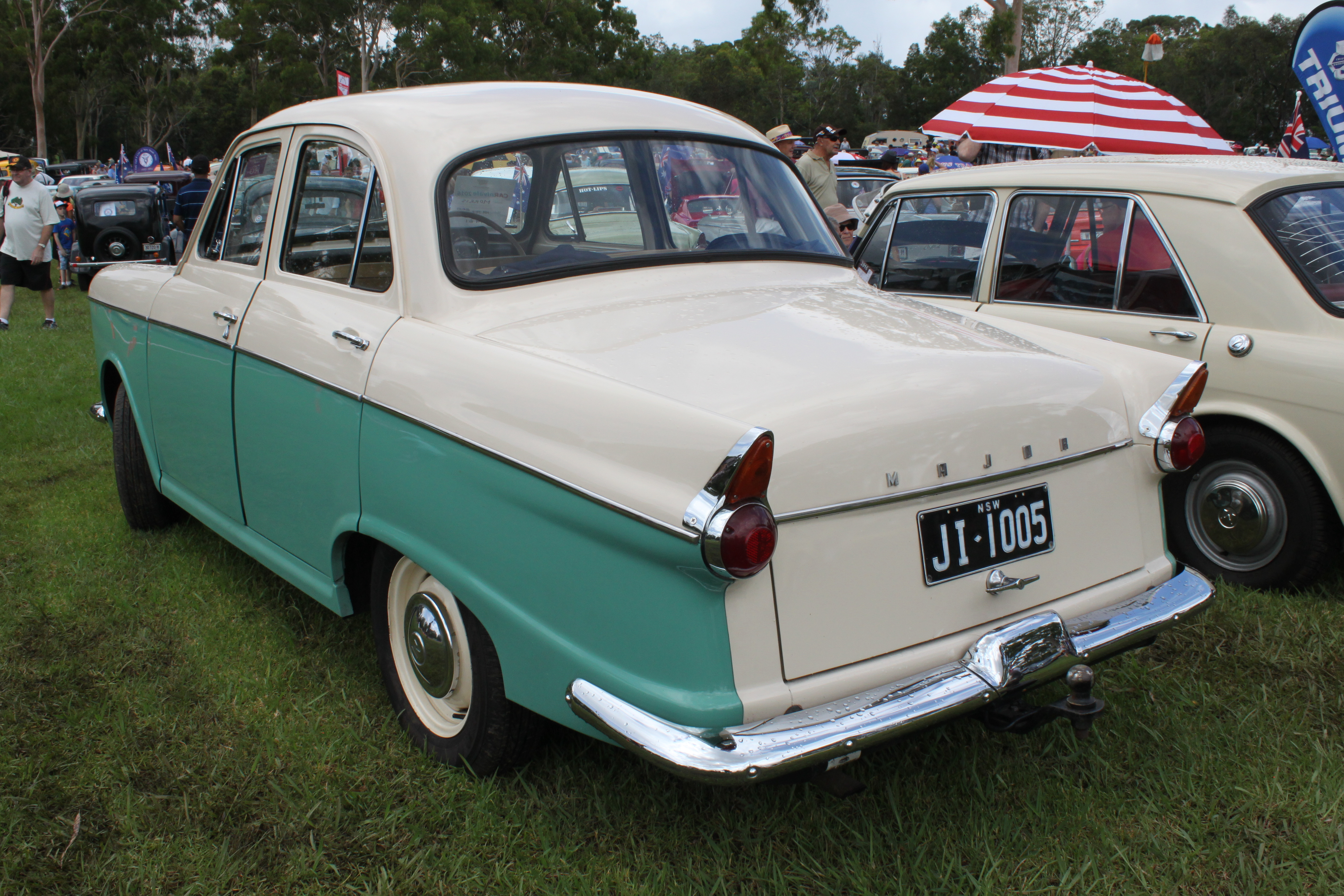 CARnivale, Parramatta Park, NSW Australia Day 2016